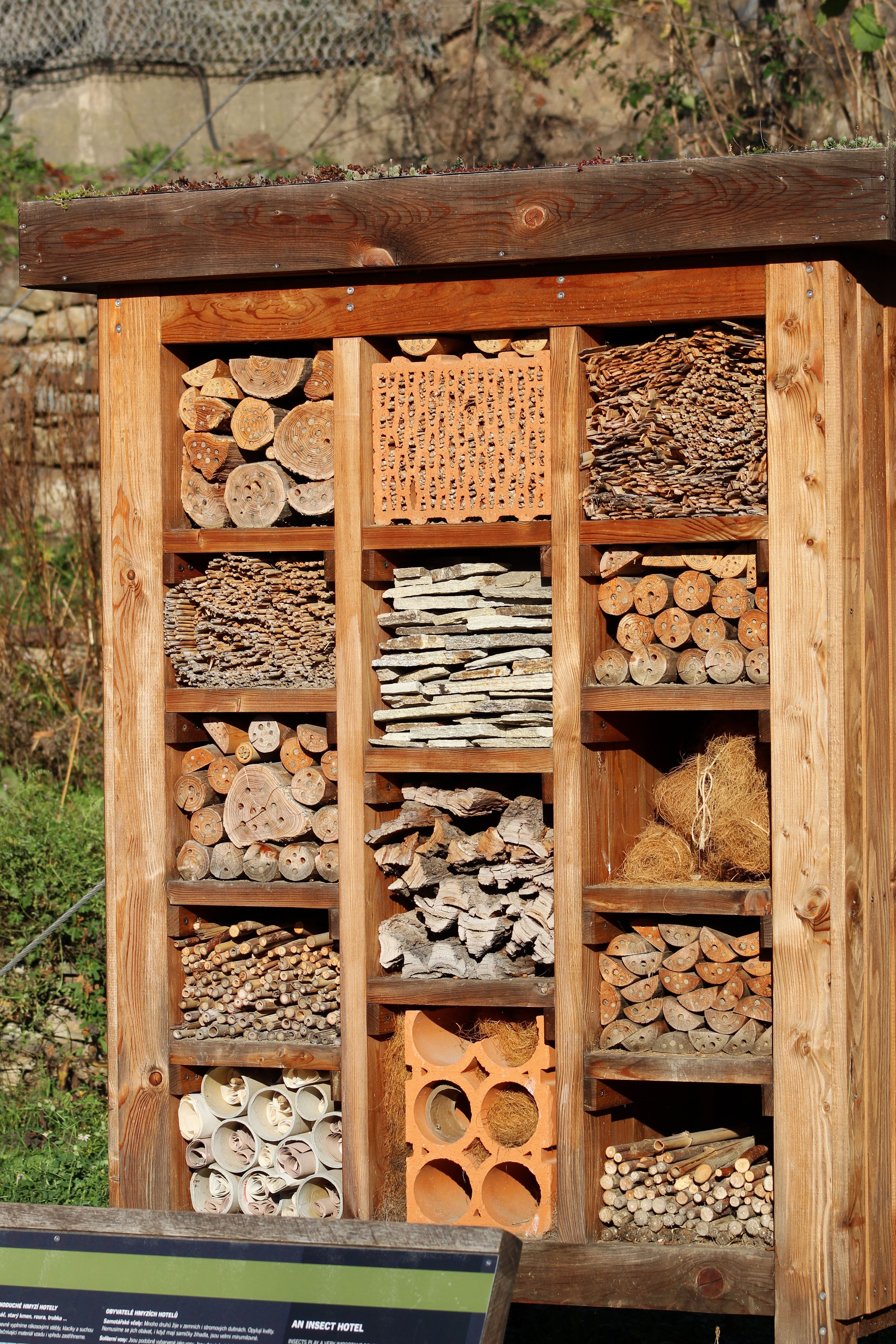 Project: Fotíme Česko.